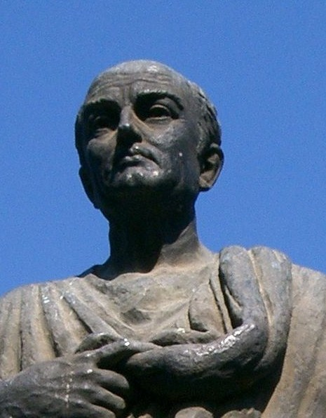 Statue de Sénèque (philosophe de l'école stoïcienne, dramaturge et homme d'État romain du Ier siècle de l'ère chrétienne) dans sa ville natale, l'actuelle Cordoue en Andalousie.